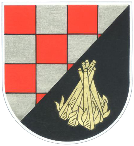 Wappen von Börfink